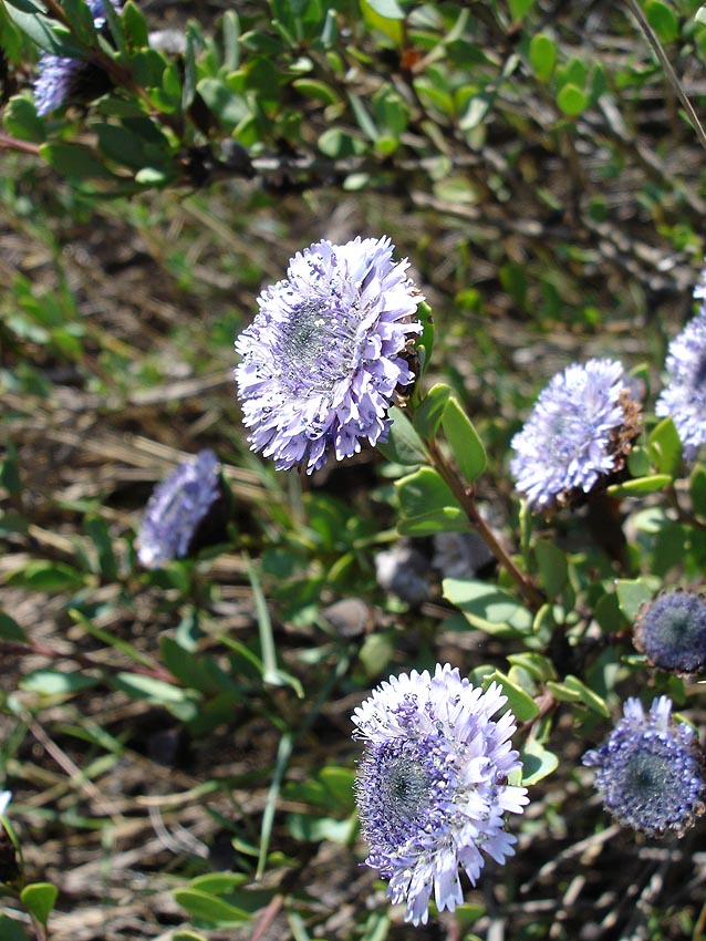 Globularia alypum (globulaire buissonnante)Photo prise à Castelnou en avril 2005 Jean Tosti 2005